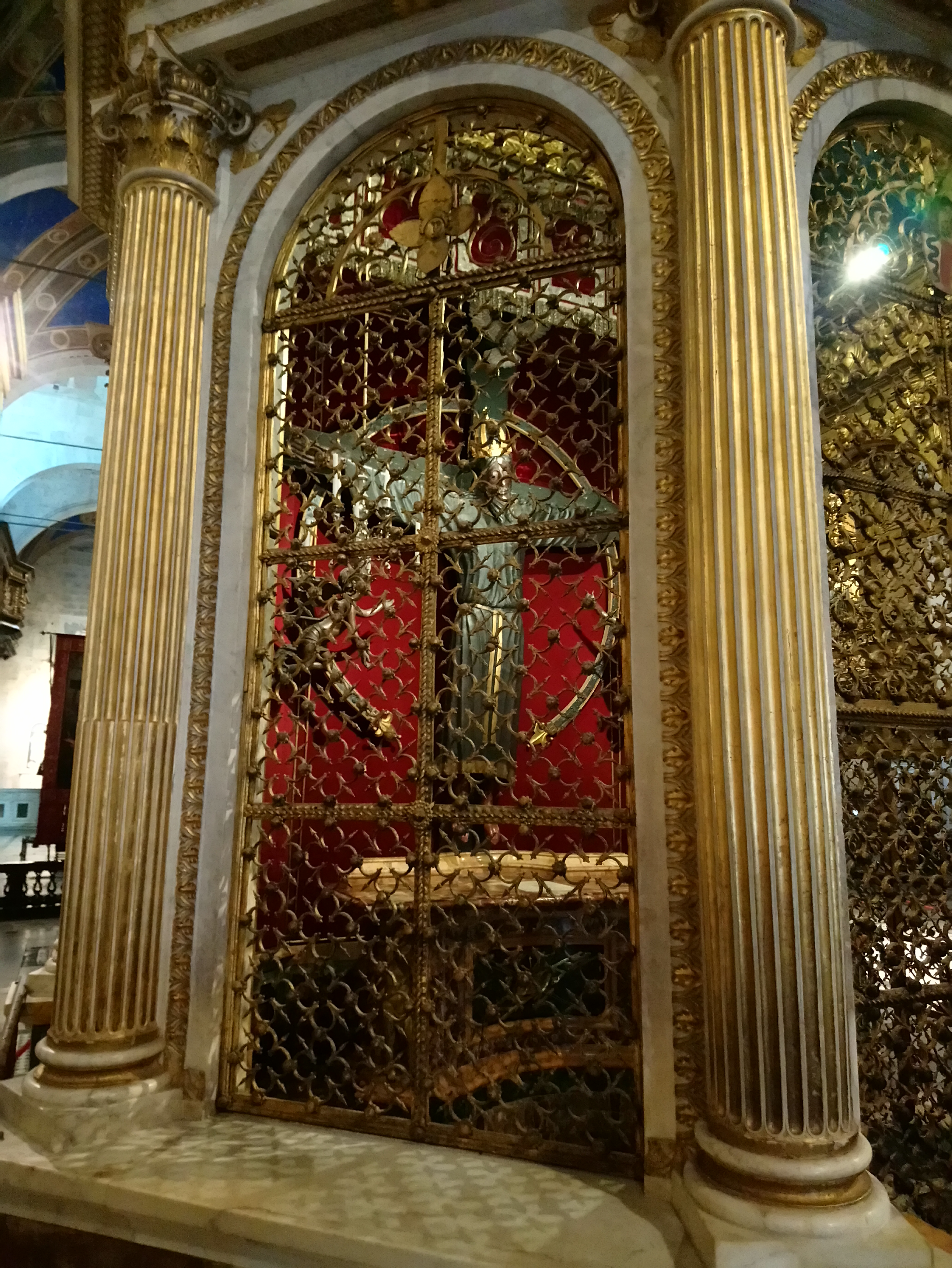 Lucca, Kathedrale San Martino: Volto Santo, evtl. die künstlerische Vorlage für das Imervard-Kreuz im Braunschweiger Dom.